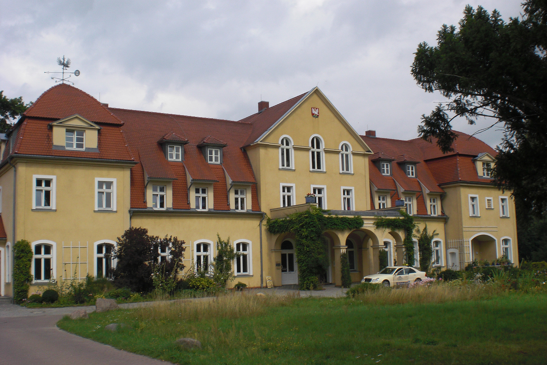 Gut Groß Pankow, seit dem 17. Jh. im Besitz der Familie Gans Edle Herren zu Putlitz. Gutshaus von 1827; nach einem Brand 1924 in der heutigen Gestalt neu errichtet. Die Familie erwarb das Gutshaus 1991 und sanierte es in der Form von 1924.